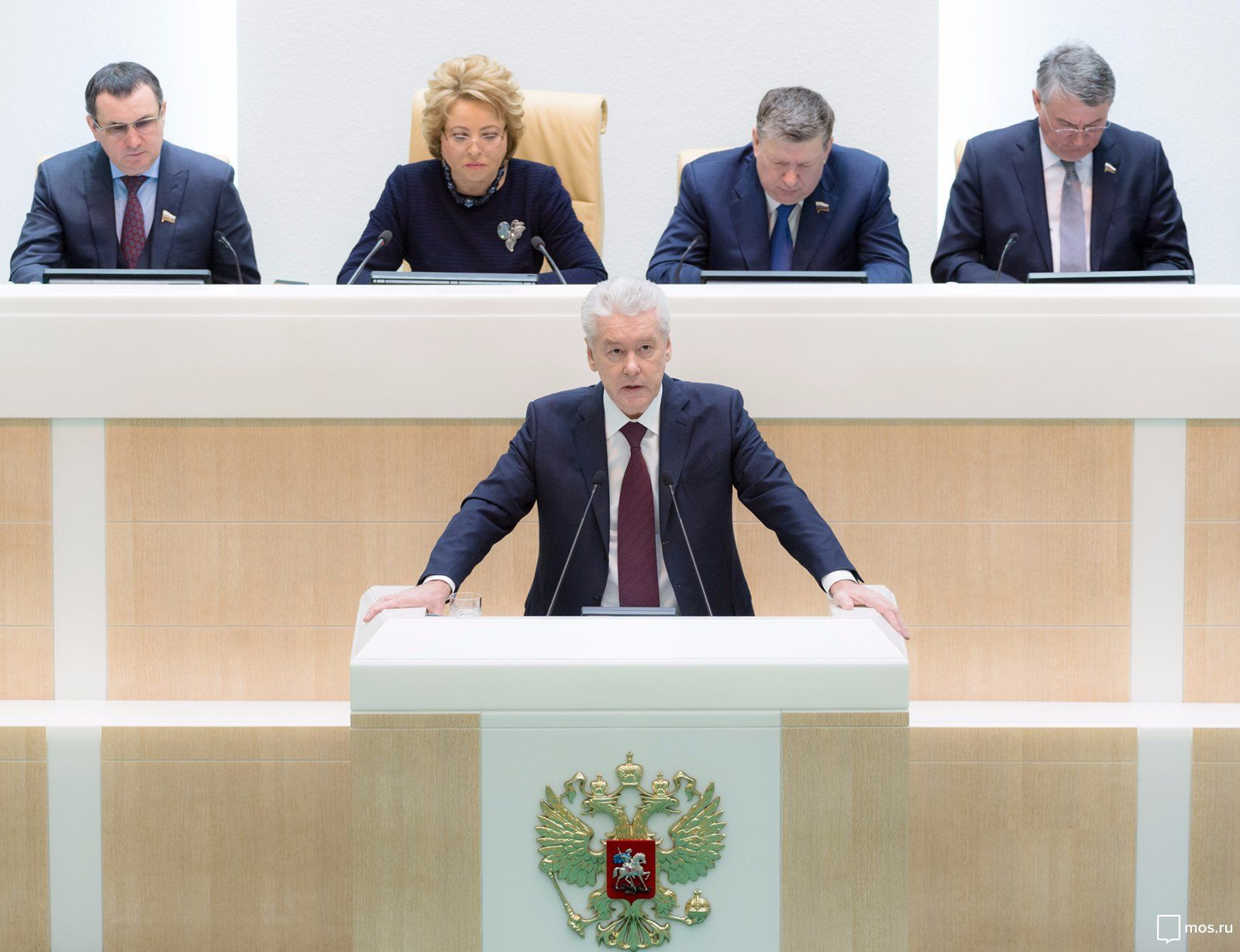 Сергей Собянин выступает на пленарном заседании Совета Федерации